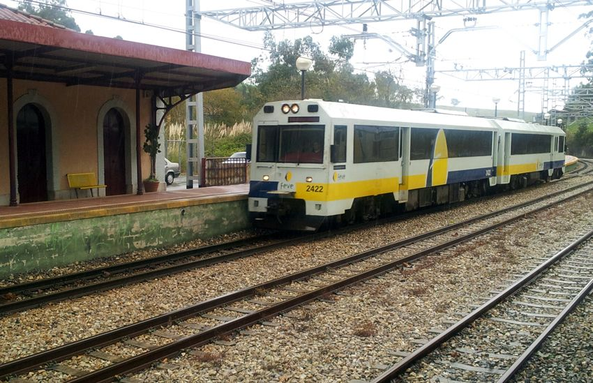 Tren Santander - Oviedo pasando por la estación de Ribadesella